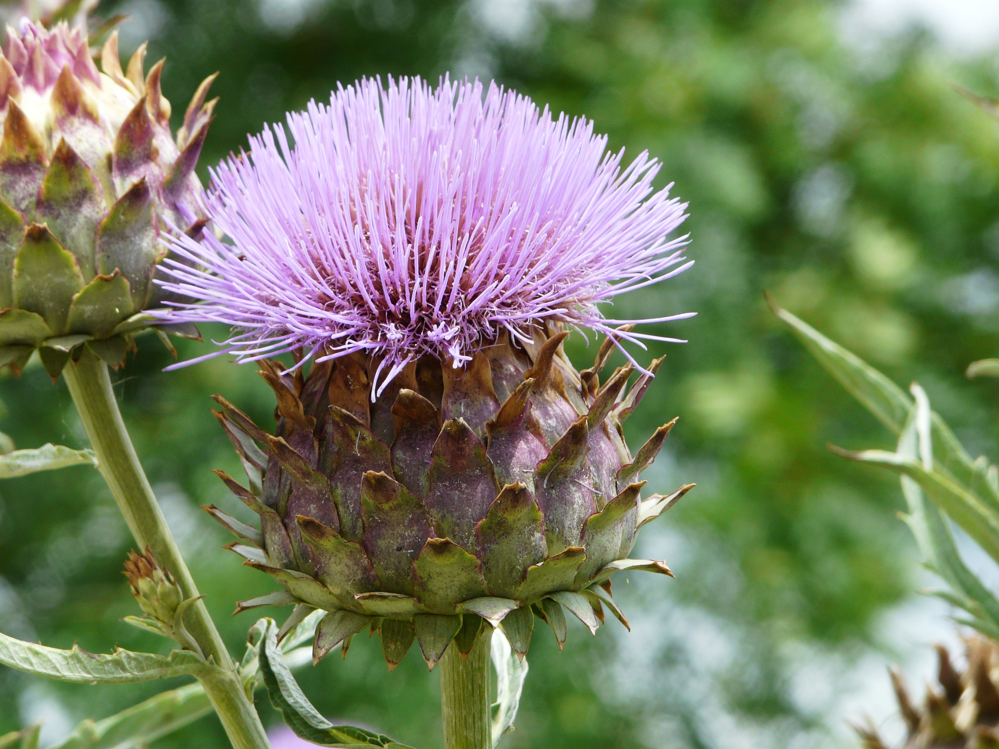 Artichaut (Cynara scolymus), Dordogne, France